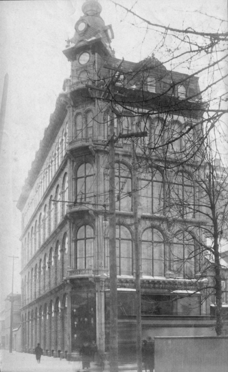 Magasin J. B. Laliberté, rue Saint-Joseph, quartier Saint-Roch, Québec